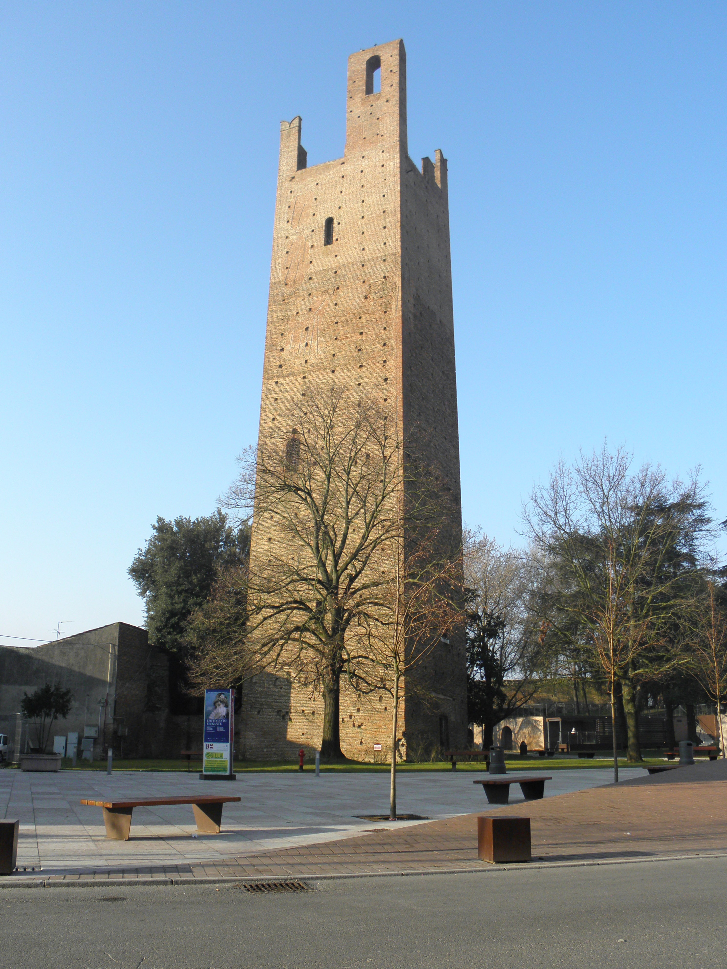 Rovigo, il castello: la torre Donà vista dal Corso del Popolo.